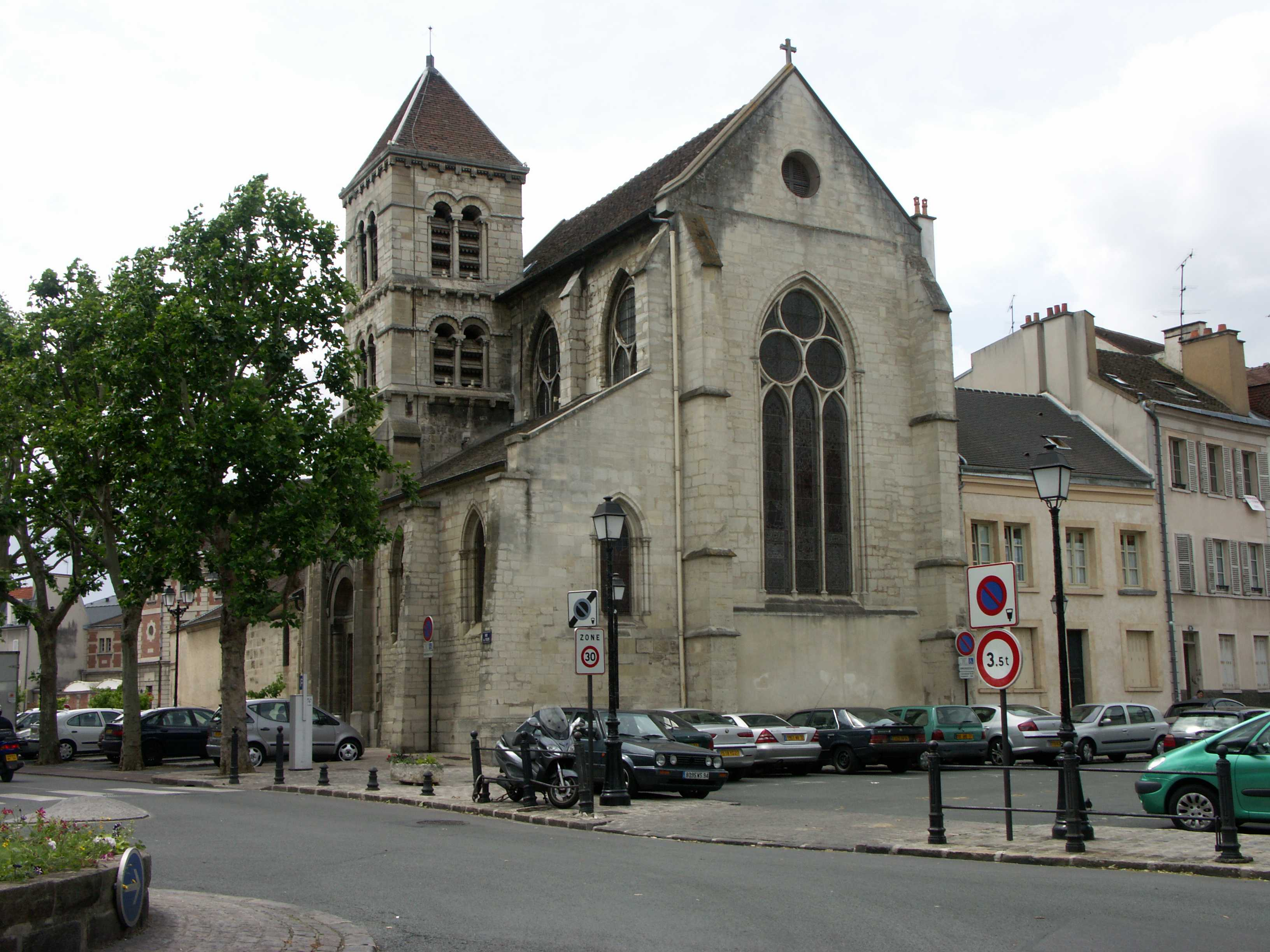 Saint Maur des Fossés - Eglise Saint Nicolas